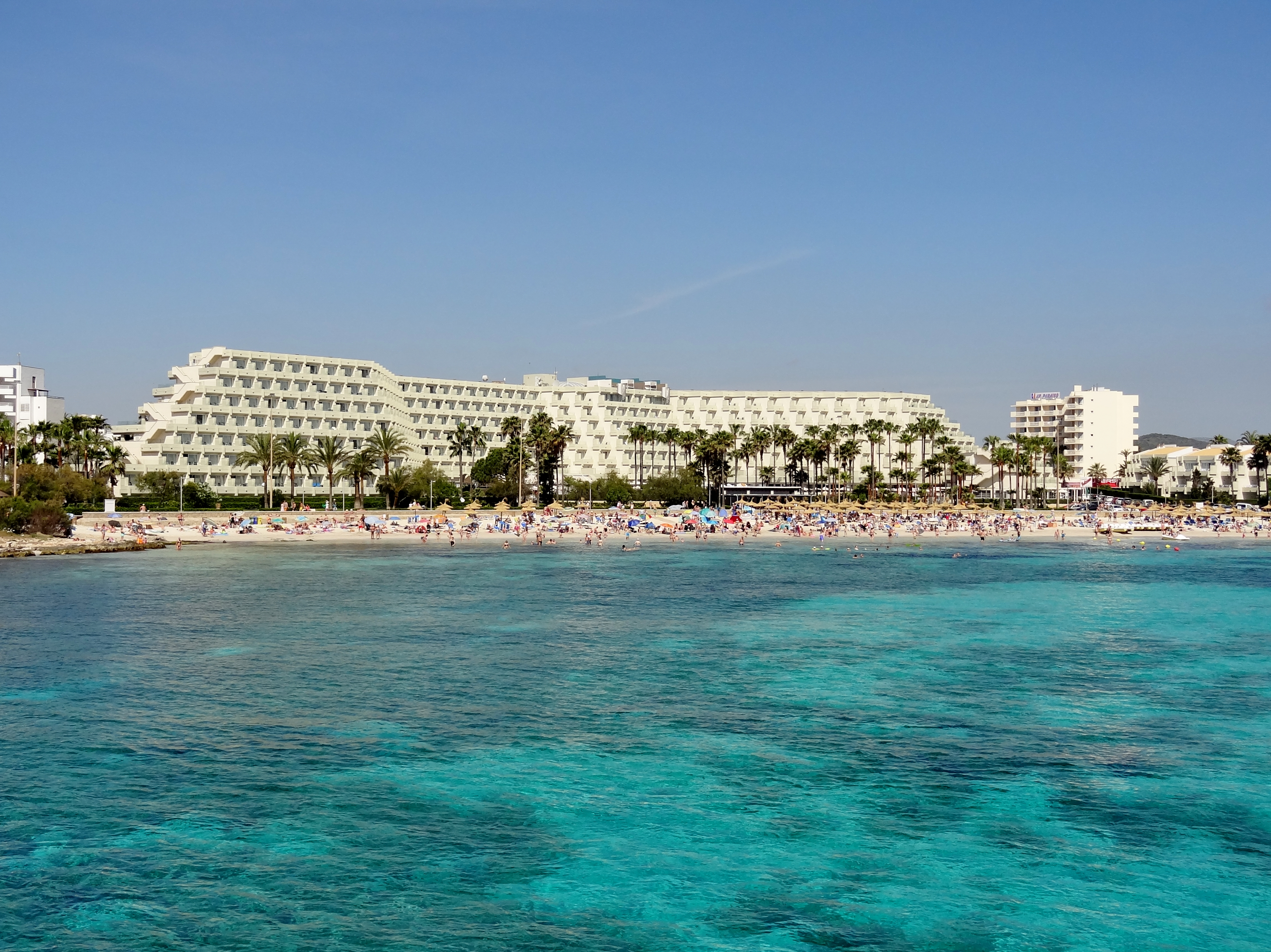 Strand von Sa Coma in der Gemeinde Sant Llorenç des Cardassar, Mallorca, Spanien